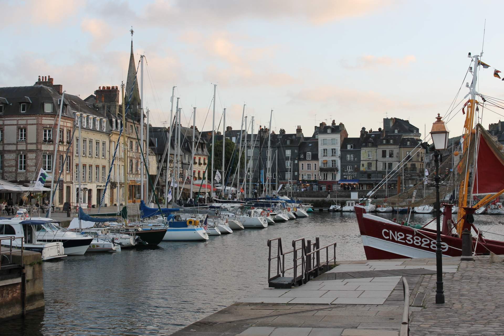 Vista del porto di Honfleur, settembre 2012